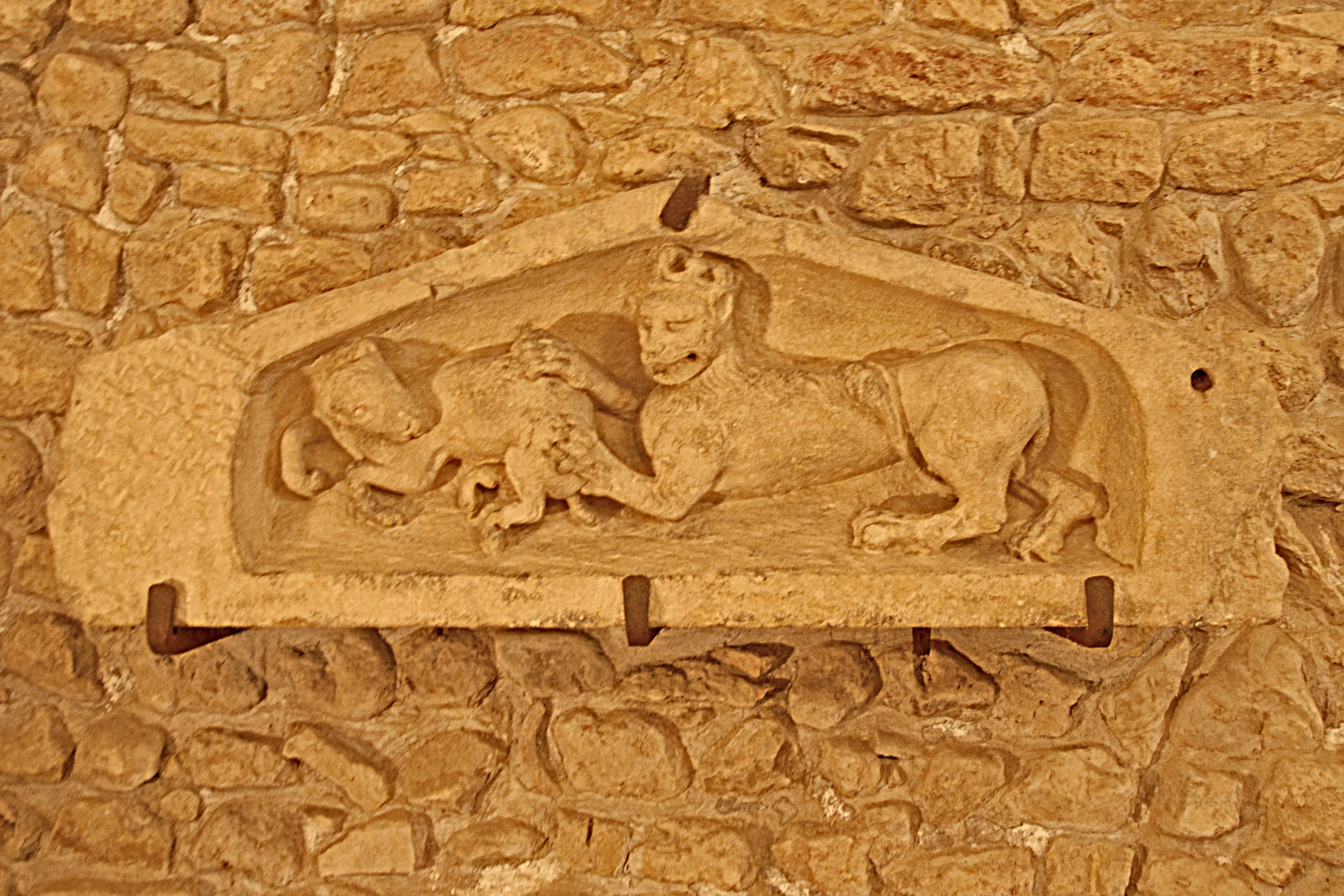 Lapidarium, Löwe reisst Beute